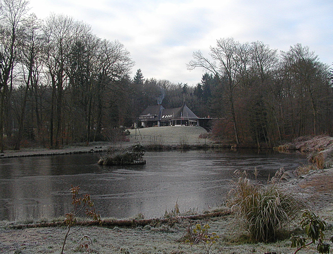 Die Gaststätte "das Forsthaus" in Winter